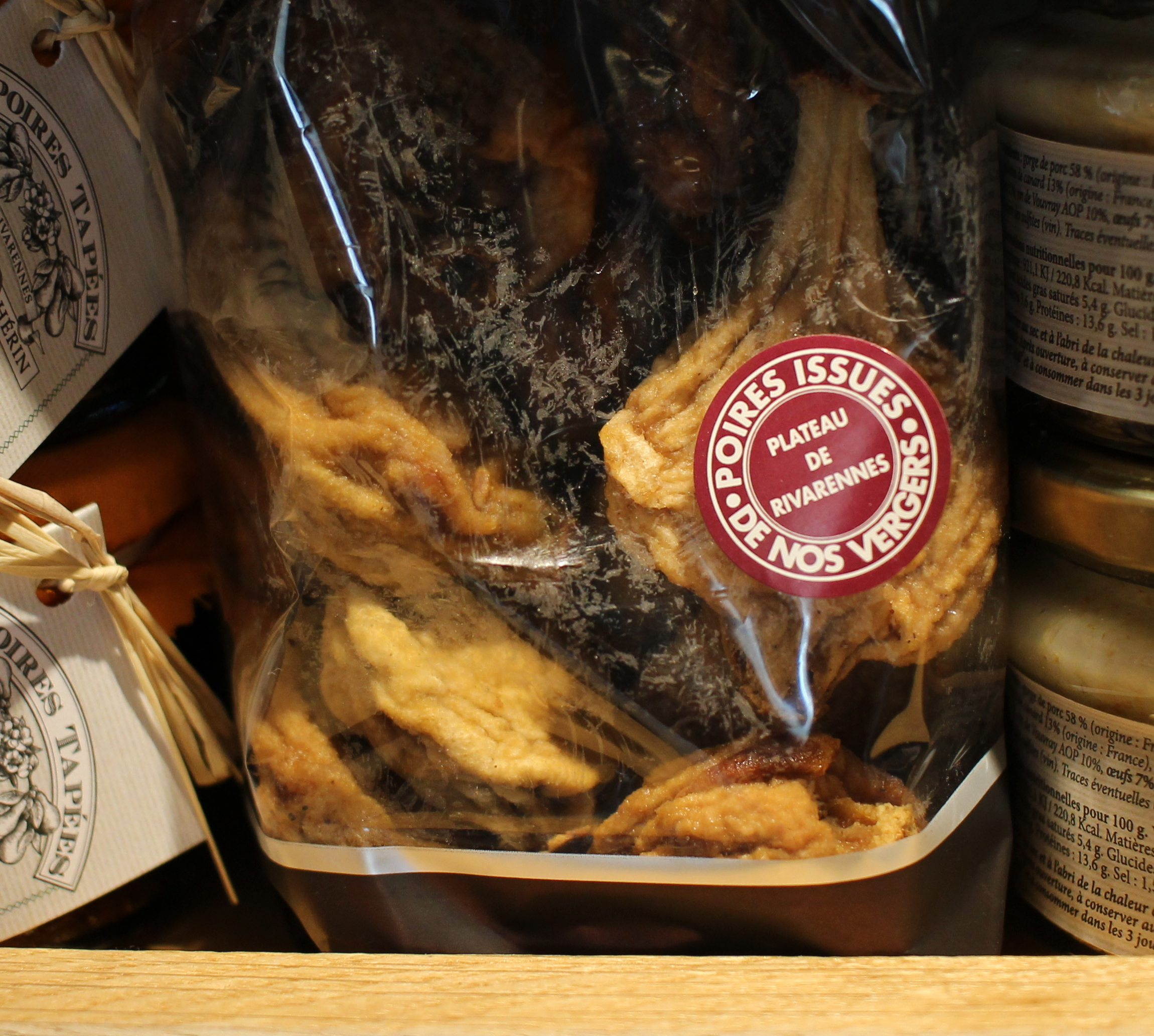 Tours - Halles de Tours - Avril 2019 - Poires tapées (sèches)